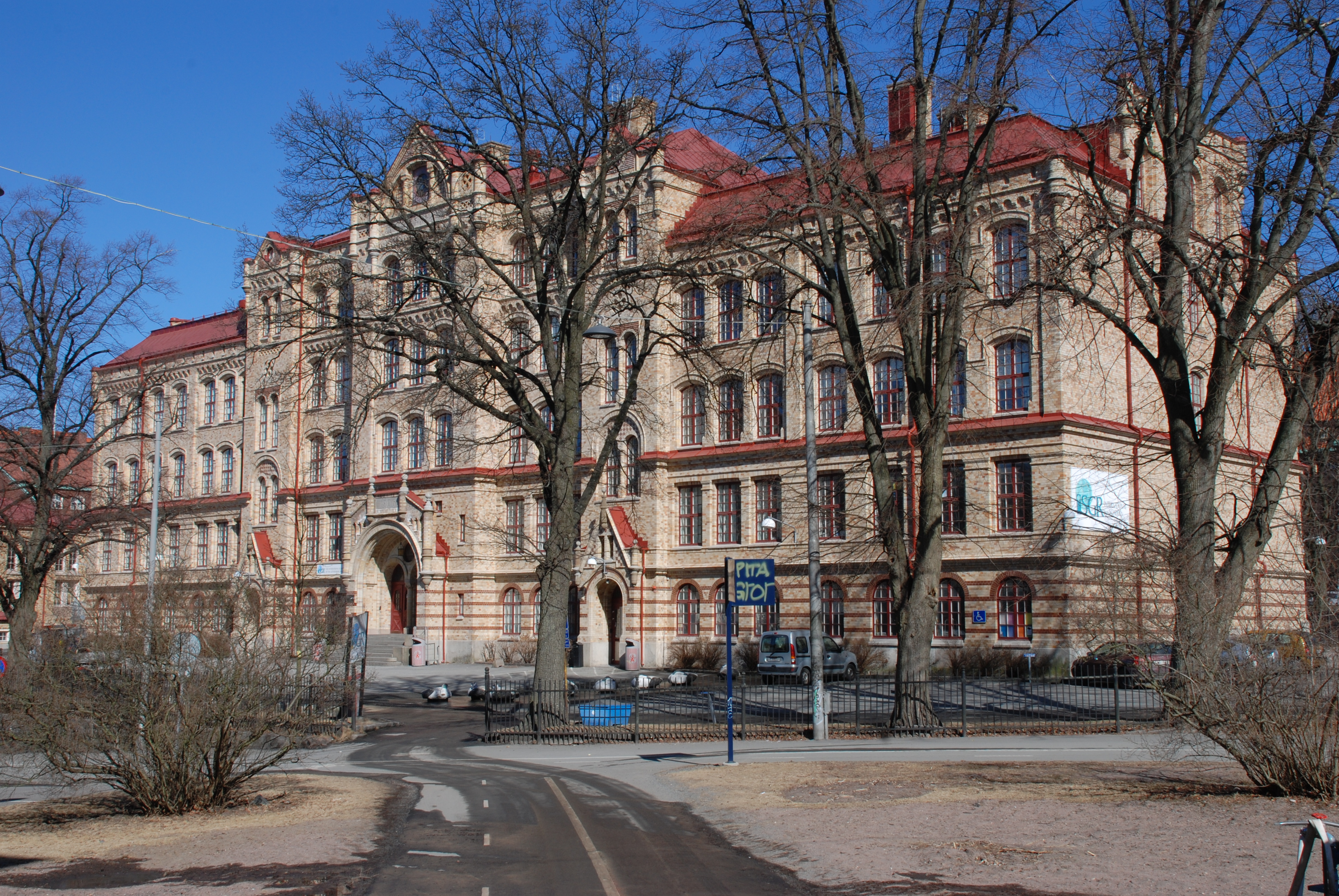 Götabergsskolan, Molinsgatan 6 i Göteborg. Numera International School of the Gothenburg Region. Byggnaden uppförd 1906.